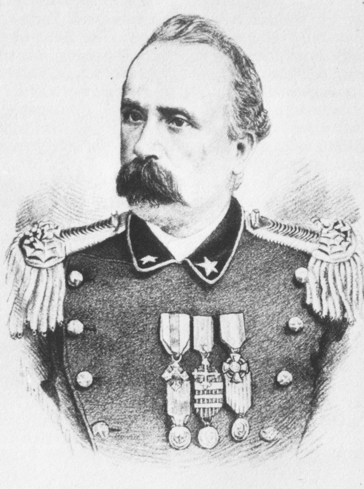 Ritratto di Orazio Dogliotti